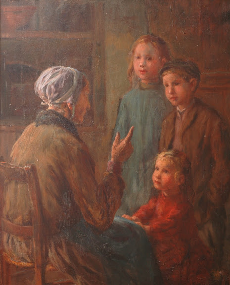 Peinture de Jean de FRANCQUEVILLE